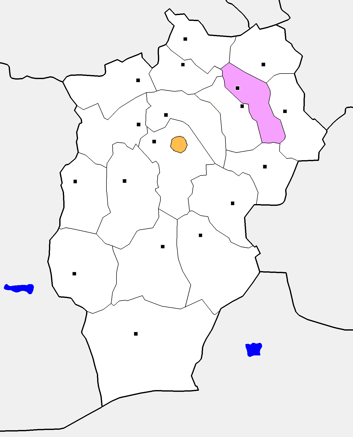 Монгол: Өвөрхангай аймгийн Есөнзүйл сумын байршил